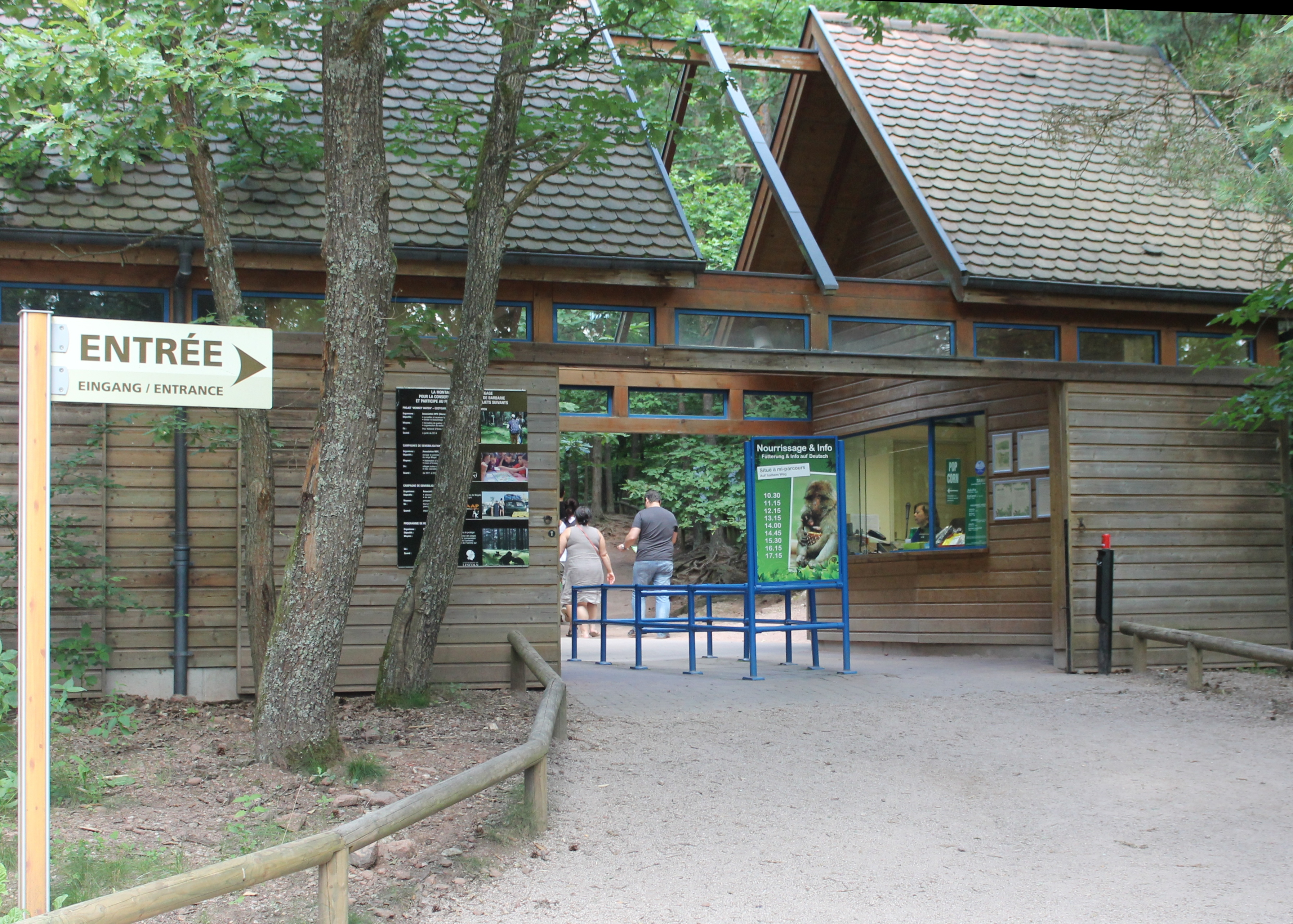 La Montagne des Singes, Kintzheim (2016)